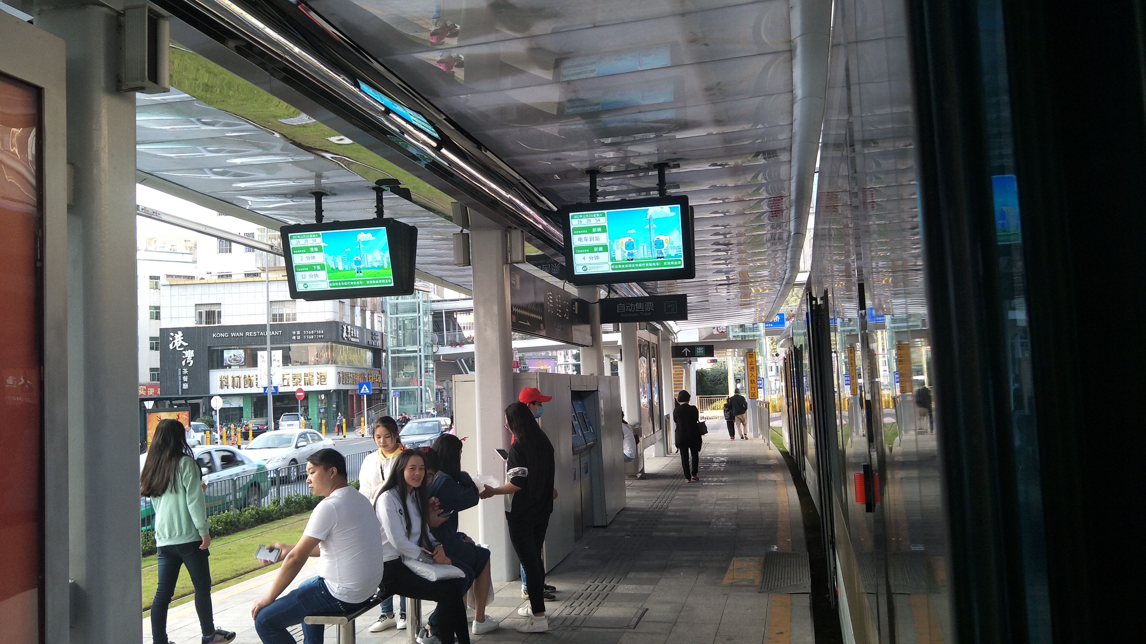 深圳有轨电车锦鲤站，位于龙华区